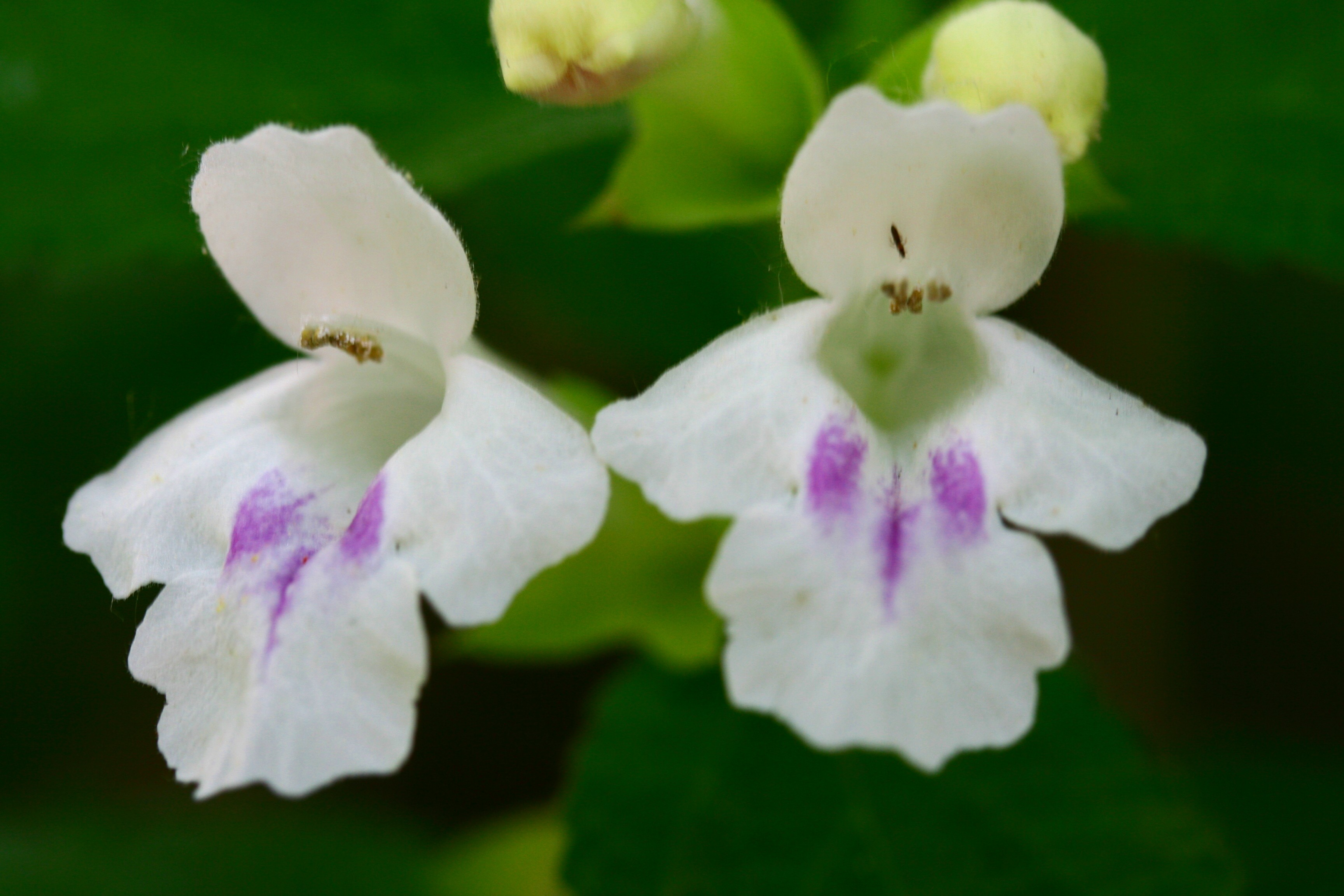 Erba limona comune Località : Pellegai, Mel (BL), 503 m s.l.m.